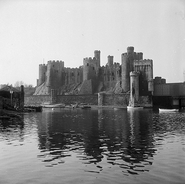 Teitl Cymraeg/Welsh title: Castell Conwy Ffotograffydd/Photographer: Geoff Charles (1909-2002) Dyddiad/Date: March 1, 1961. Cyfrwng/Medium: Negydd ffilm / Film negative Cyfeiriad/Reference: (gch23817) Rhif cofnod / Record no.: 3470928 Rhagor o wybodaeth am gasgliad Geoff Charles yn Llyfrgell Genedlaethol Cymru More information about the Geoff Charles Collection at the National Library of Wales